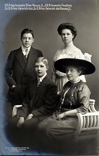 Erbprinzessin Elise Reuß j. L., geb. zu Hohenlohe-Langenburg, mit ihren Kindern Prinzessin Feodora (1889–1918), Heinrich XLIII. (1893–1912) und Heinrich XLV. (1895–1945)